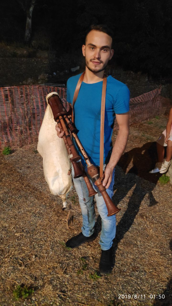 Zampogna a chiave romana delle serre tipo "menzietta" o "menzetti" 2019